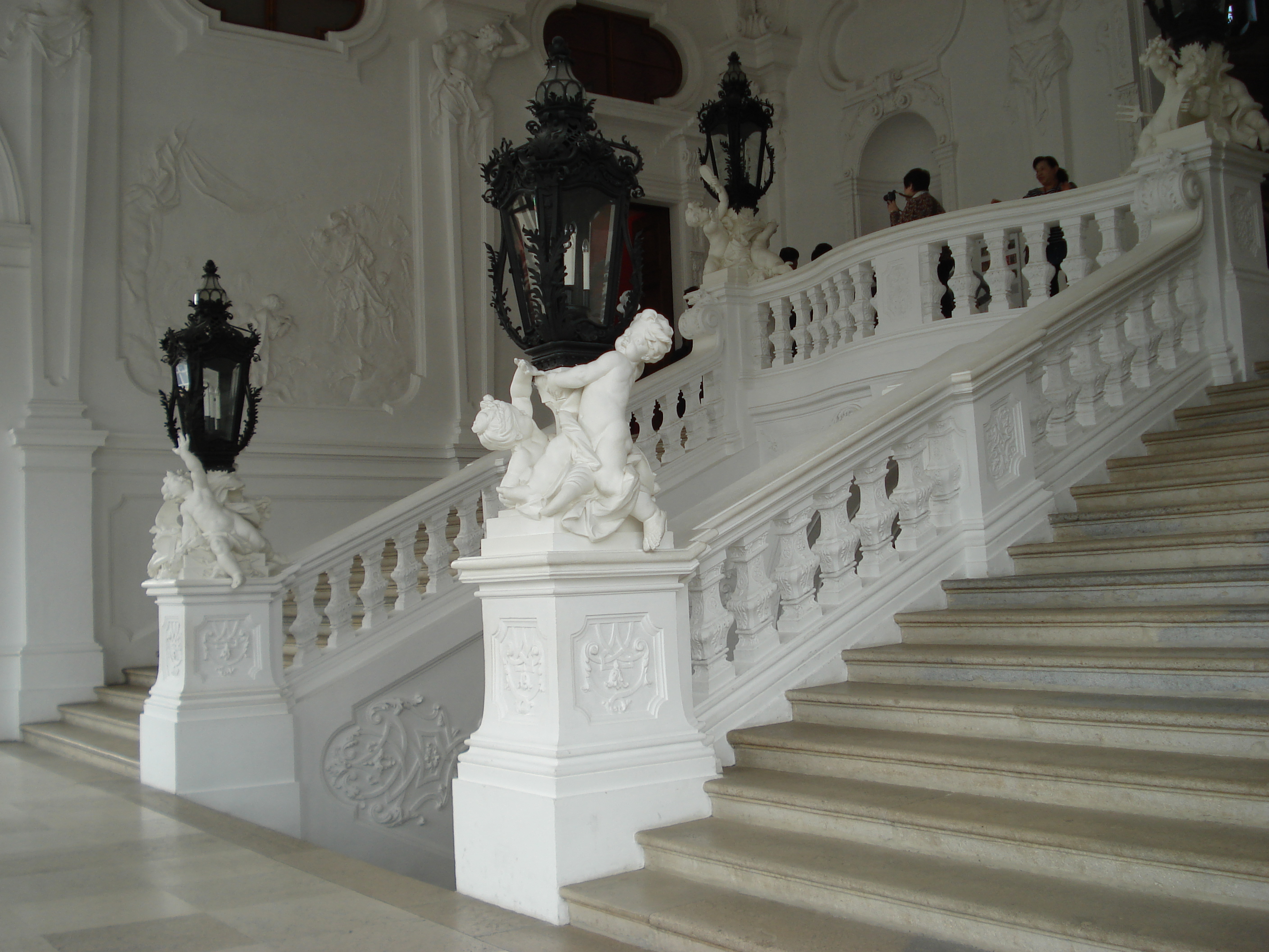 Oberes Schloss Belvedere Prunktreppe